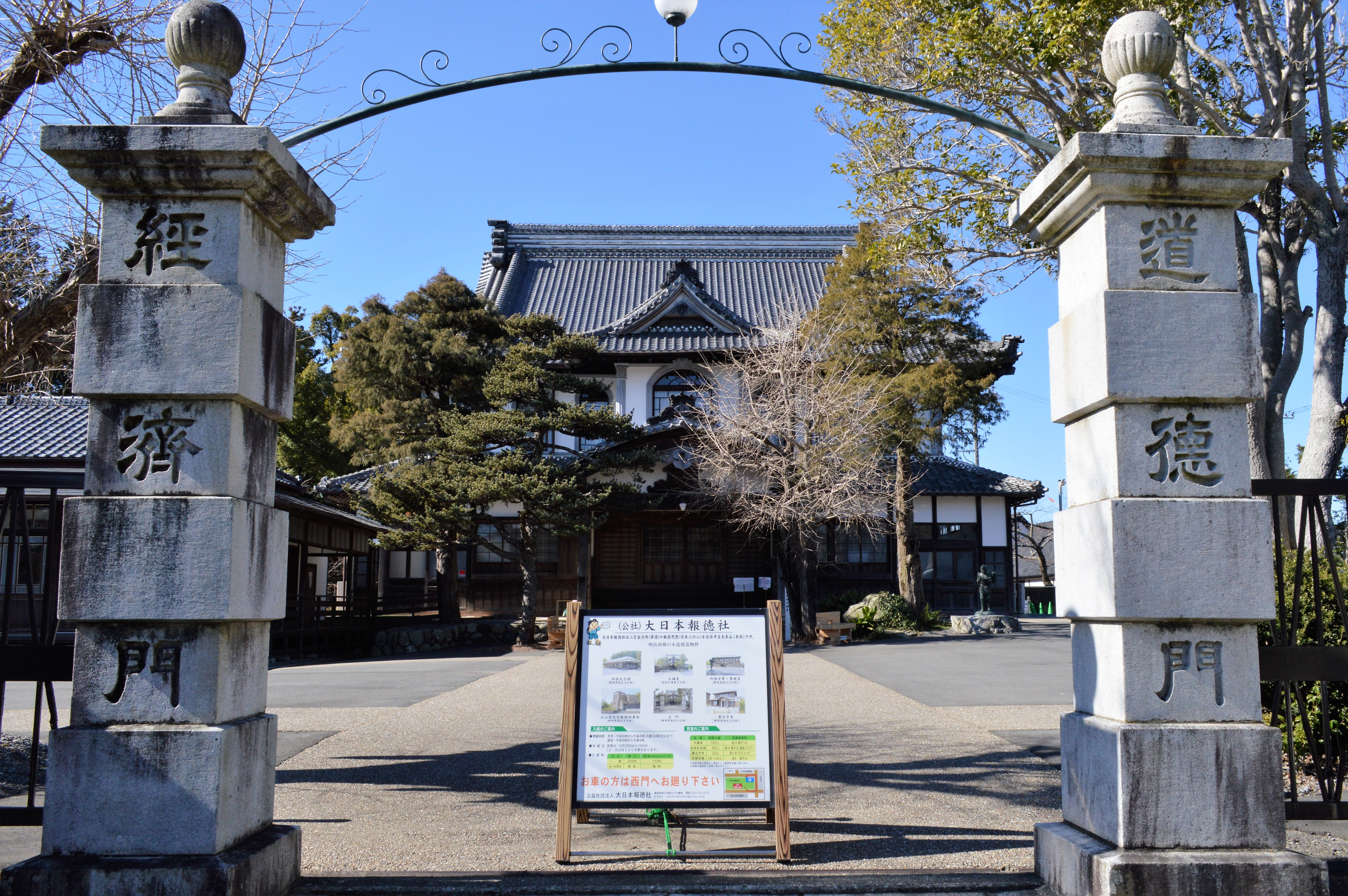 大日本報徳社正門。